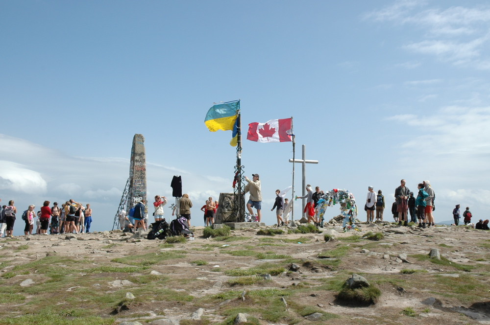 Hoverla